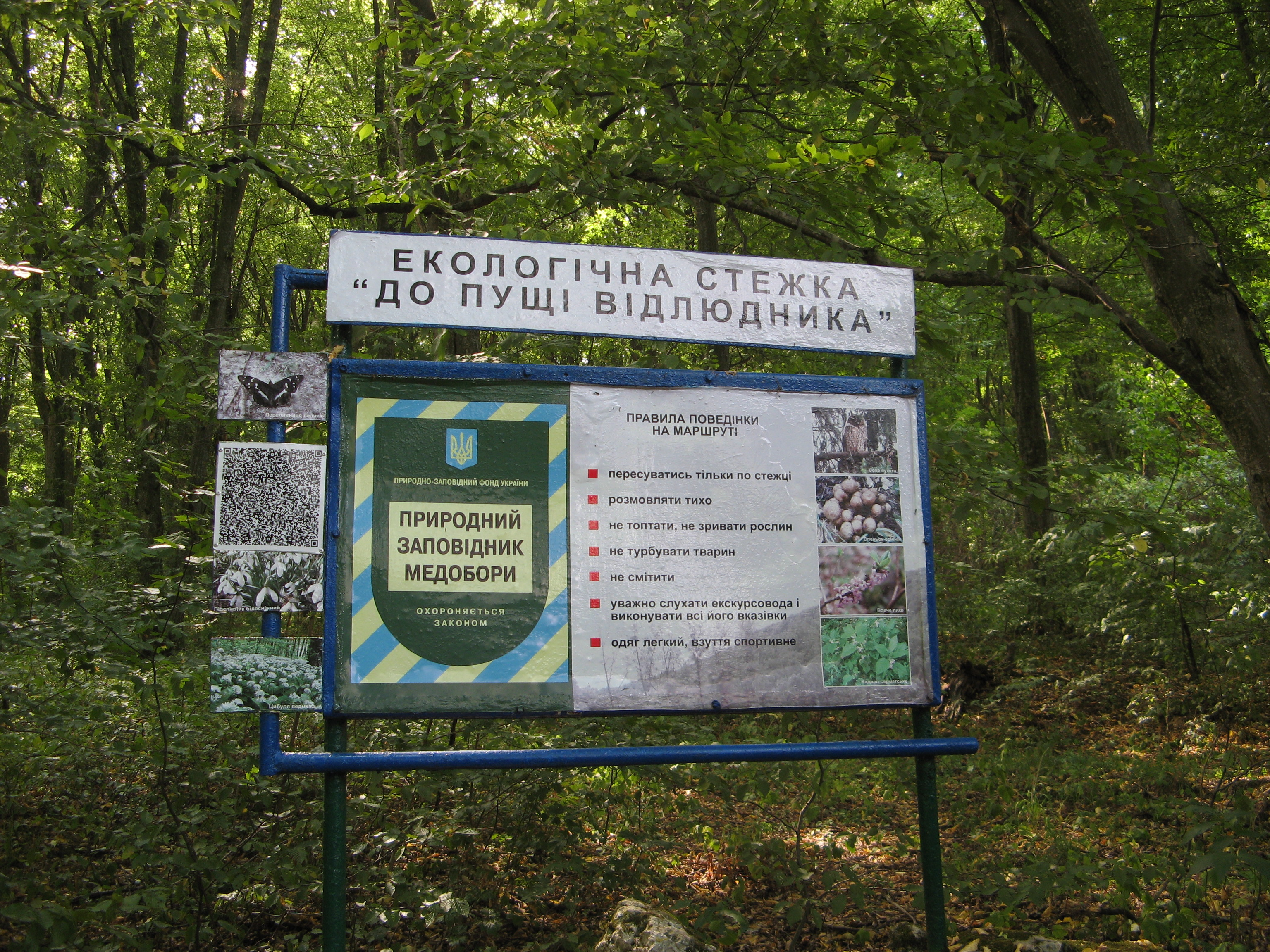 Природний заповідник «Медобори» (Гусятинський р-н, Тернопільська обл.)